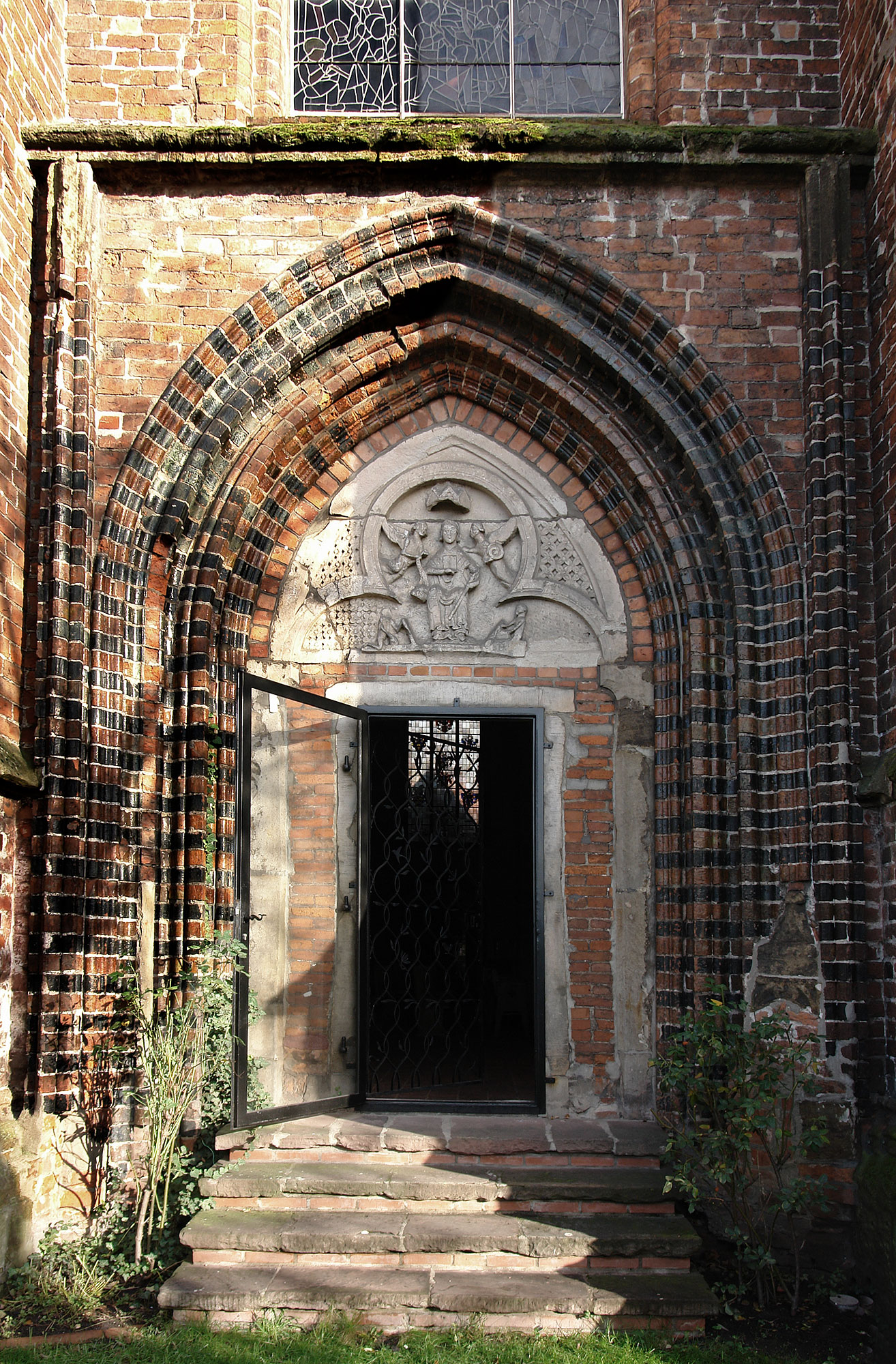 St.Martini-Kirche in Bremen. Portal mit Weltgerichtsdarstellung. Das Tympanonfeld stammt aus dem zweiten Viertel des 13.Jh.